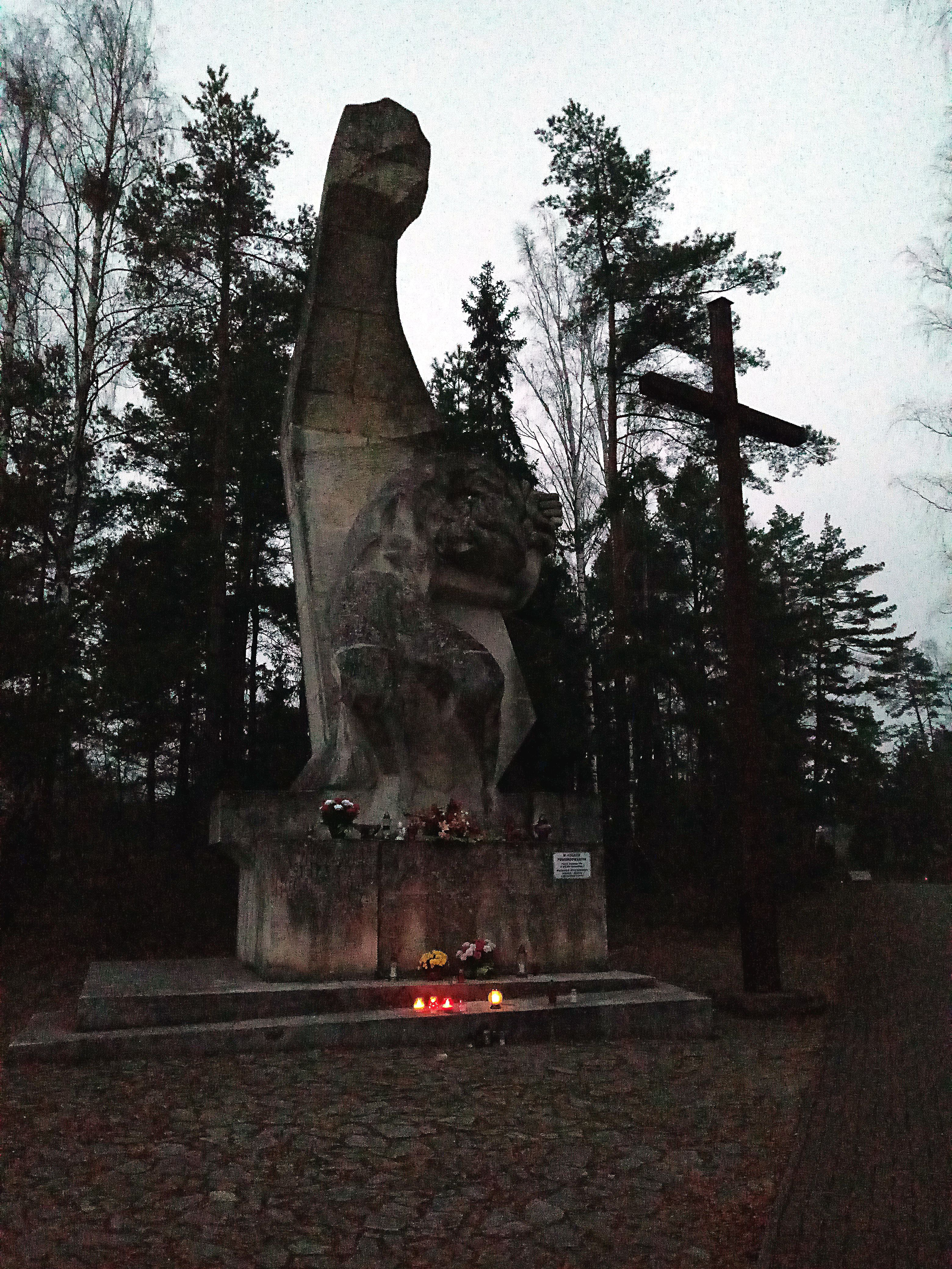 Pomnik poświęcony Ofiarom zbrodni II wojny światowej, 1973 r., Grabówka, piaskowiec autor Stanisław Wakuliński.